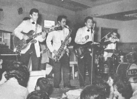 Los Teen Tops en Argentina en vivo